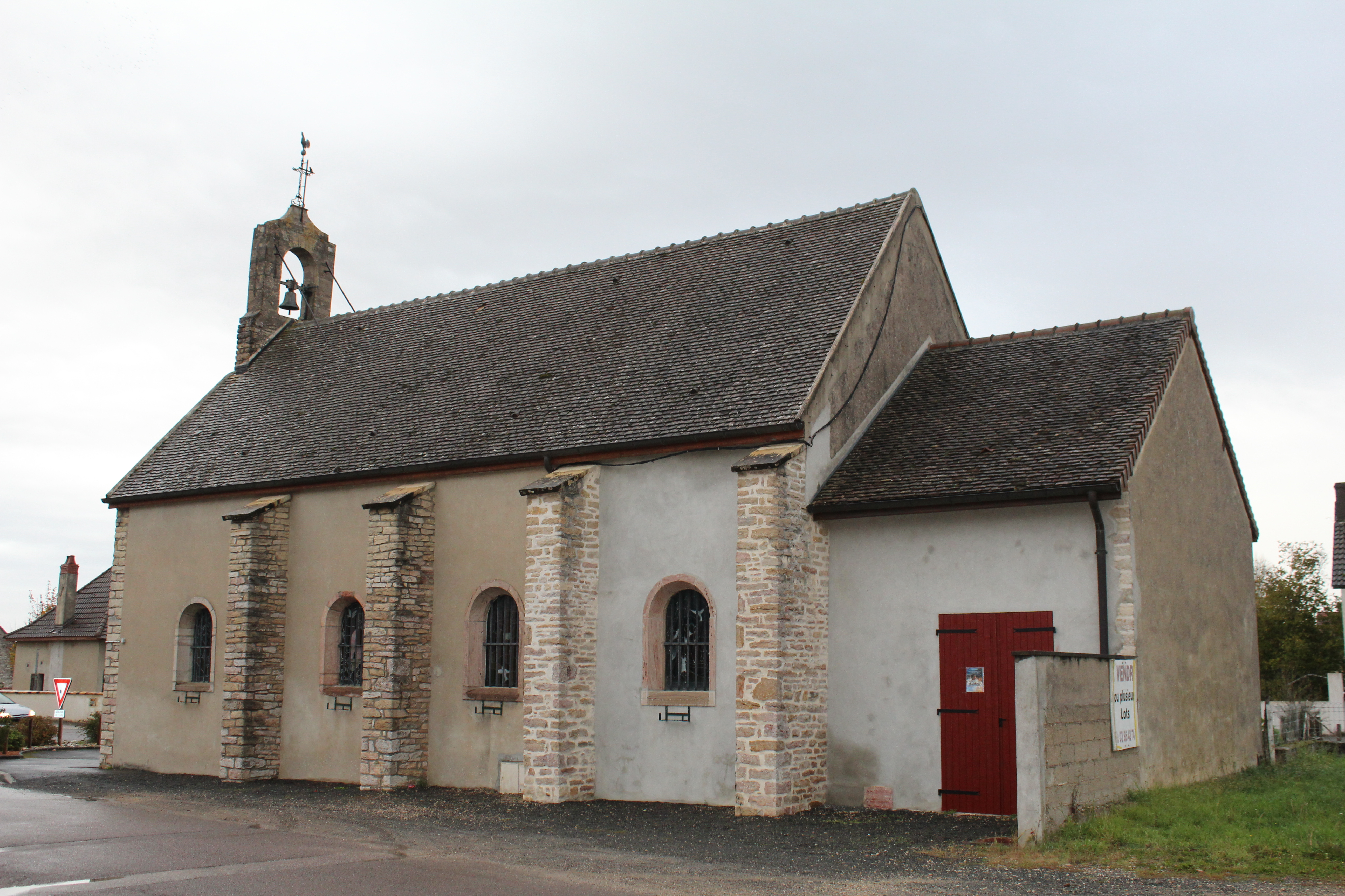 Église Saint-Marcel d'Épervans.